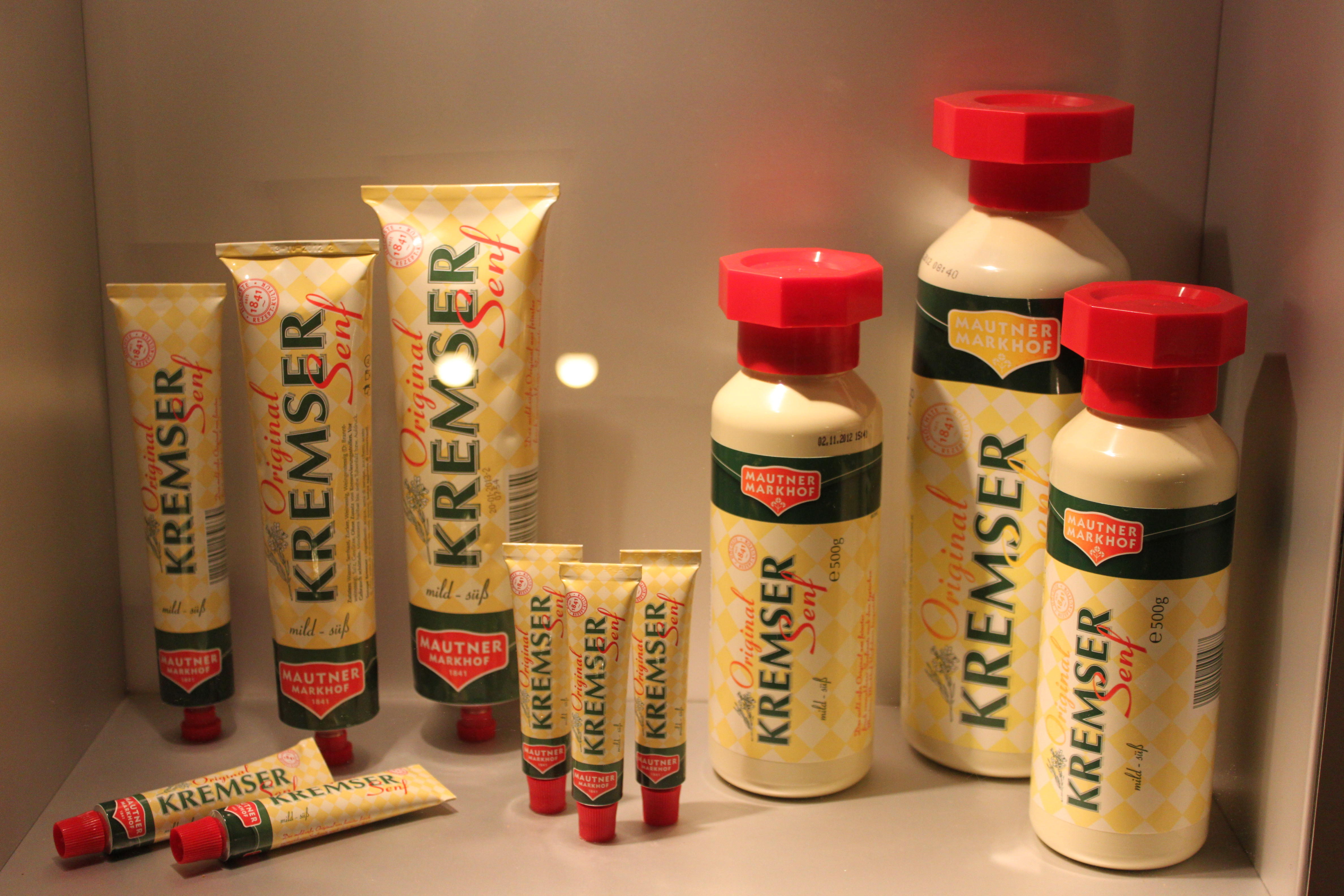 Original Kremser Senf der Marke Mautner Markhof, Zusammenstellung im MuseumKrems